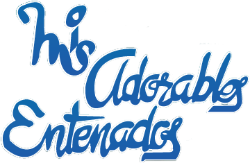 Texto usado para el nombre del programa Mis adorables entenados. Este texto y figuras geométricas básicas no alcanza el umbral de la originalidad.